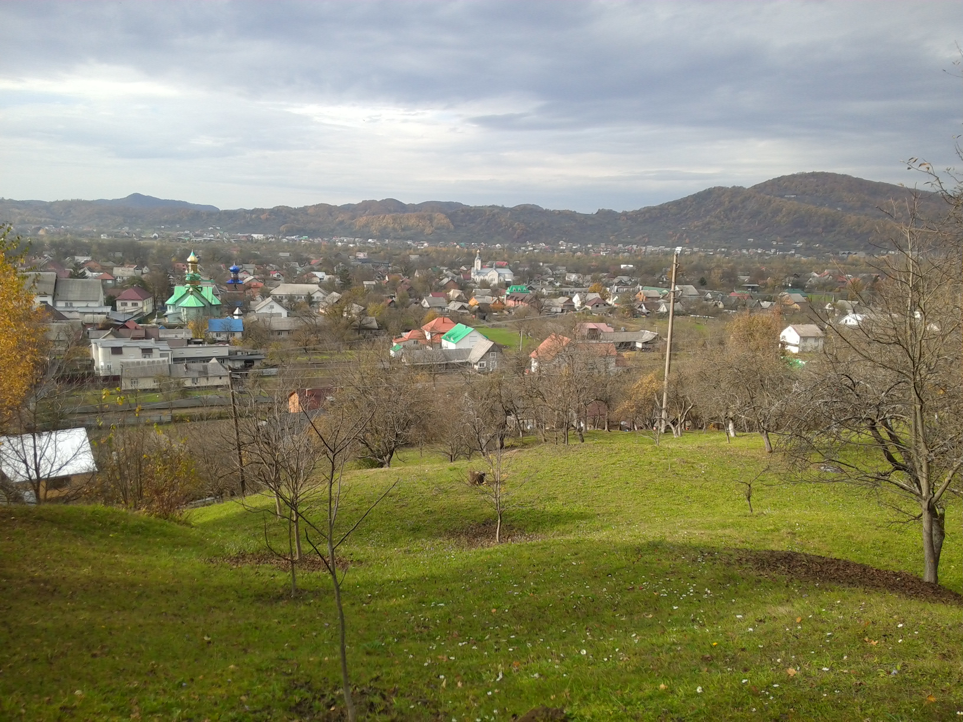 Село Терново, Тячівський район, Закарпатська область.